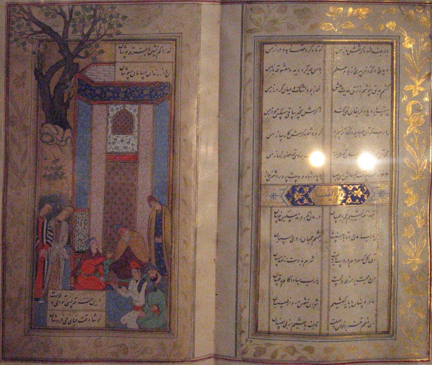 Divan de Hafez, Nastaliq, contenant 6 miniatures. Signé par Shah Qasem, 1617. National Iran Museum, Tehran.